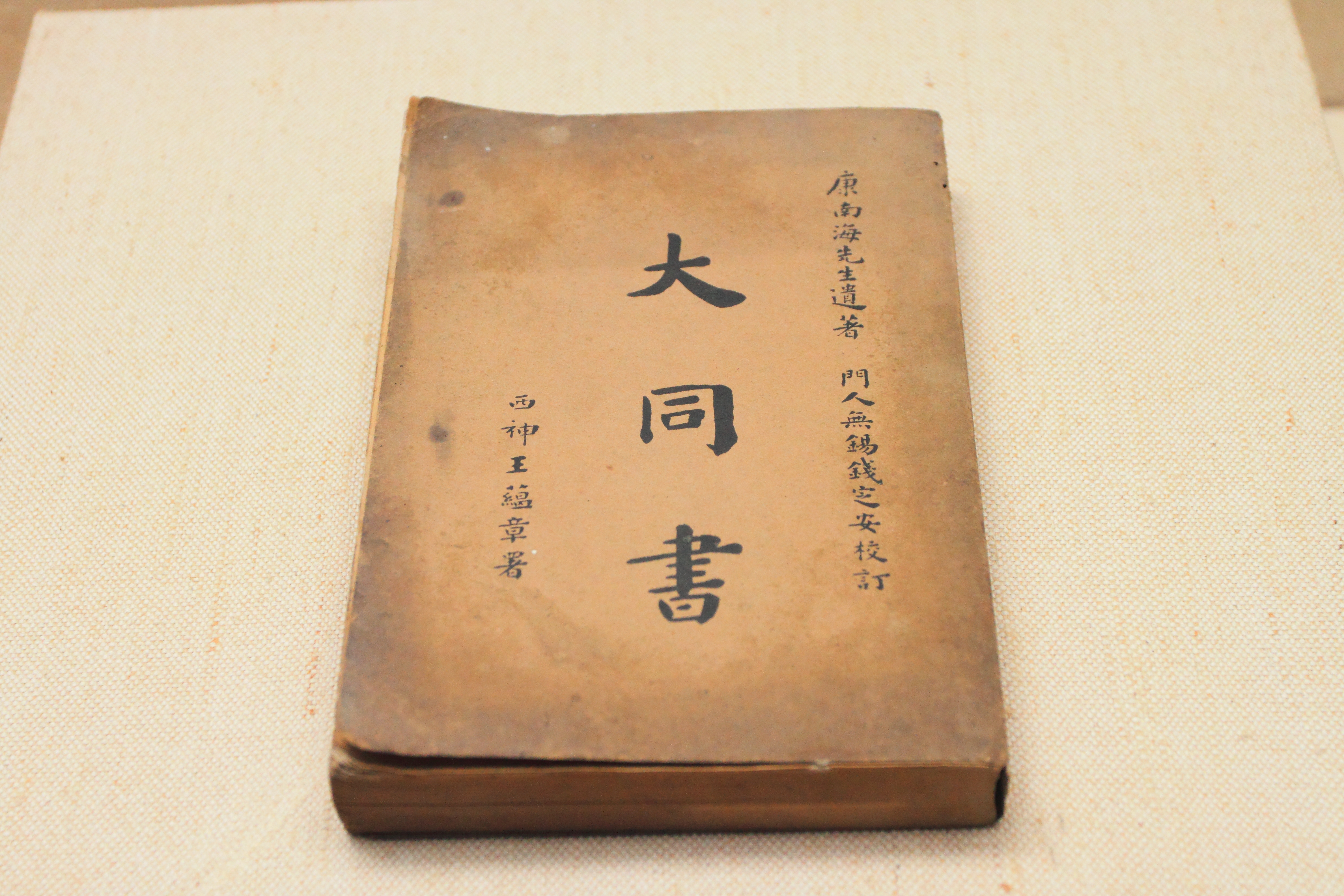 广东省博物馆 —— 《大同书》